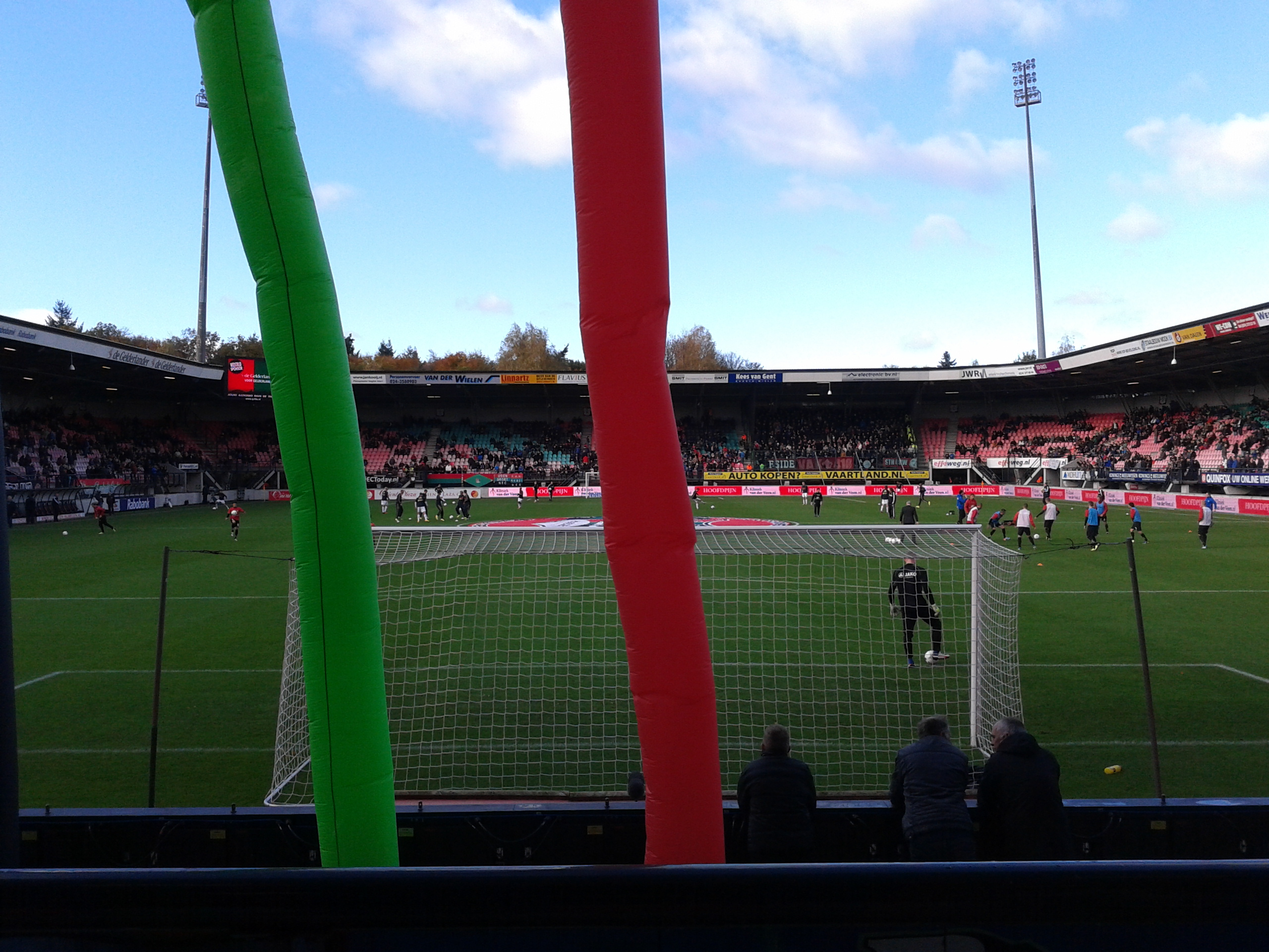 Sfeer impressie van de thuiswedstrijd tegen Ajax in 2013.